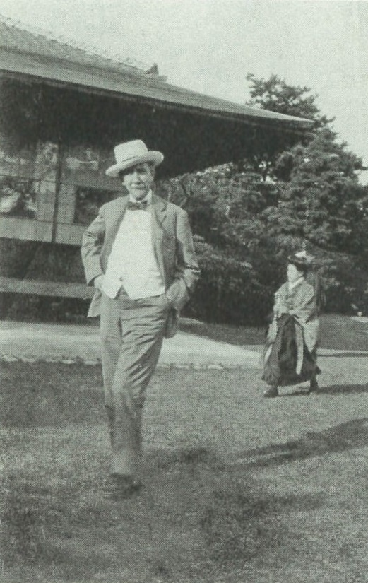 明治42年10月9日撮影。宣教開始50年記念会園遊会におけるウィリアム・インブリー